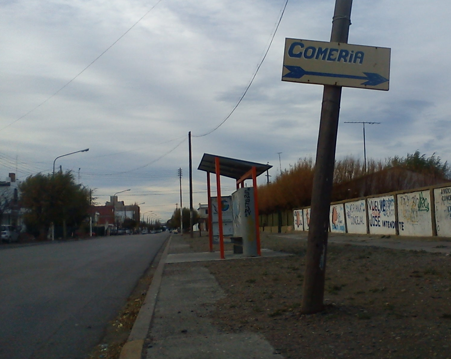 Parada de Autobuses Caleta Olivia